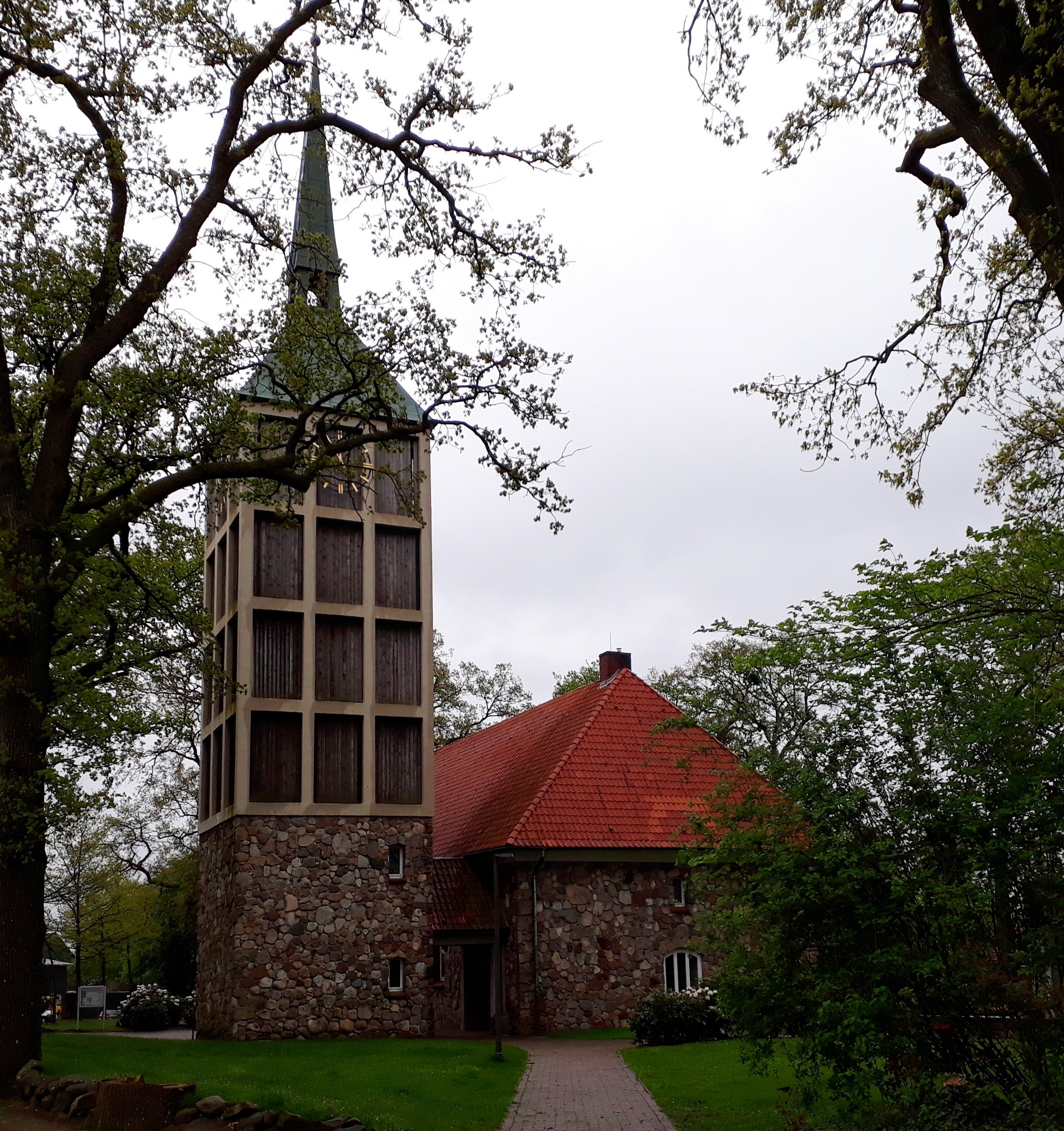 Ev.-luth. St.-Primus-Kirche Bargstedt, Kreis Stade (Nds.)